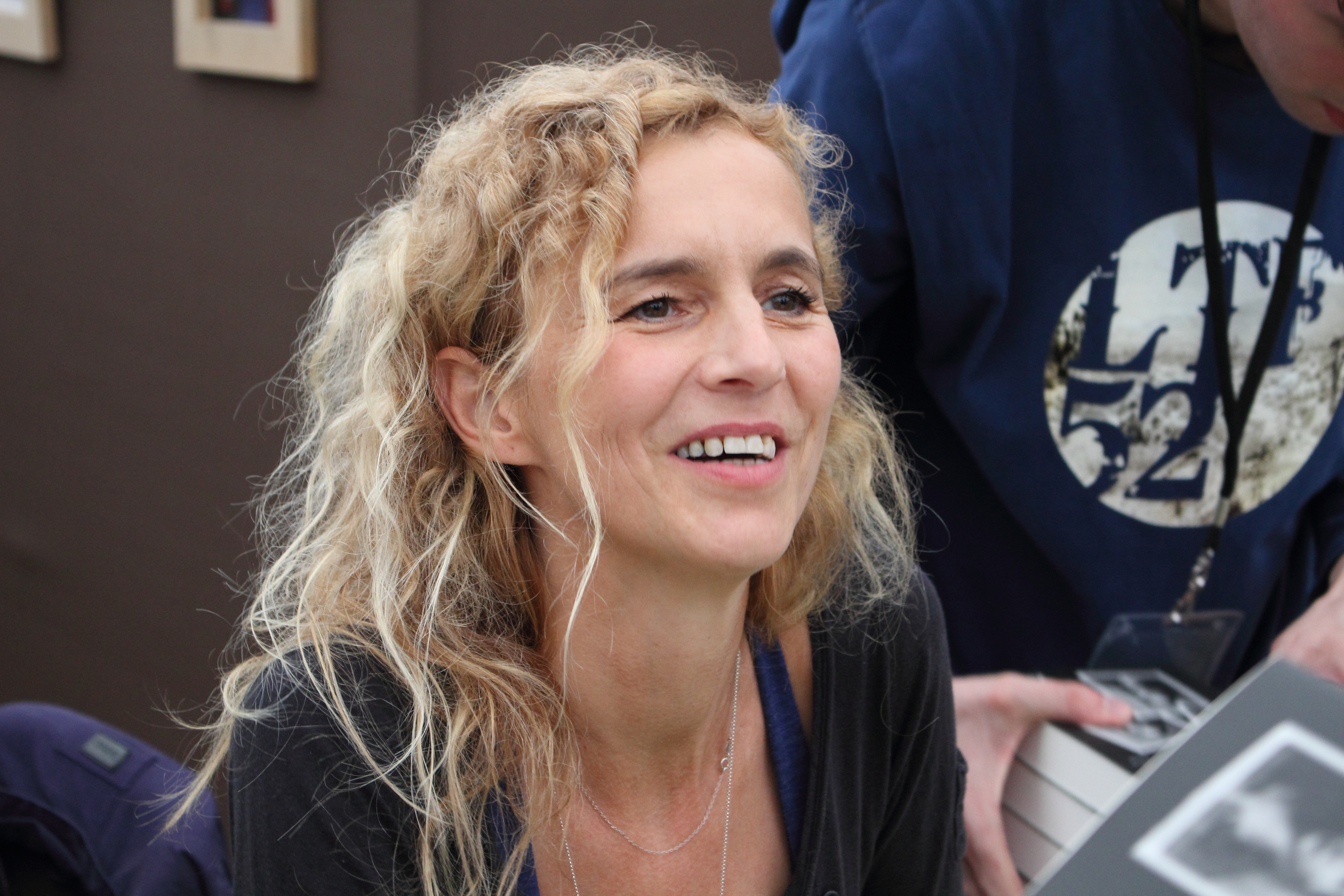 Delphine de Vigan - Le Livre sur la Place